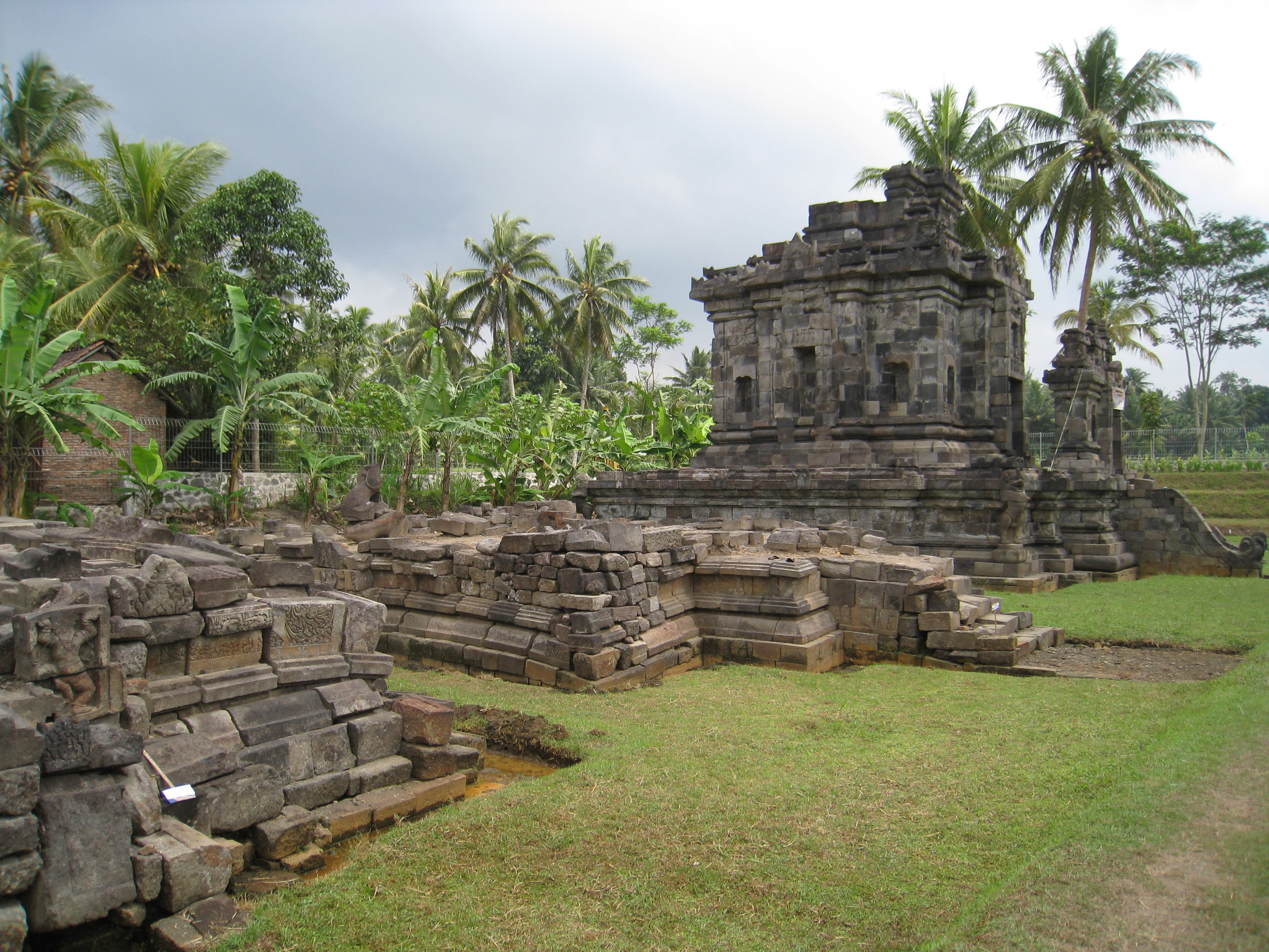 001 Candi Ngaren, Java Photograph of Candi Ngawen in Java, Indonesia taken by Anandajoti.